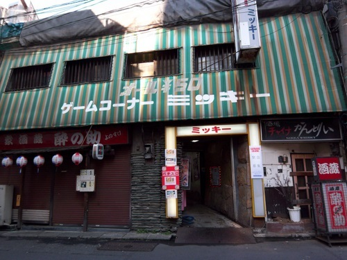 Game Arcade "Micky"